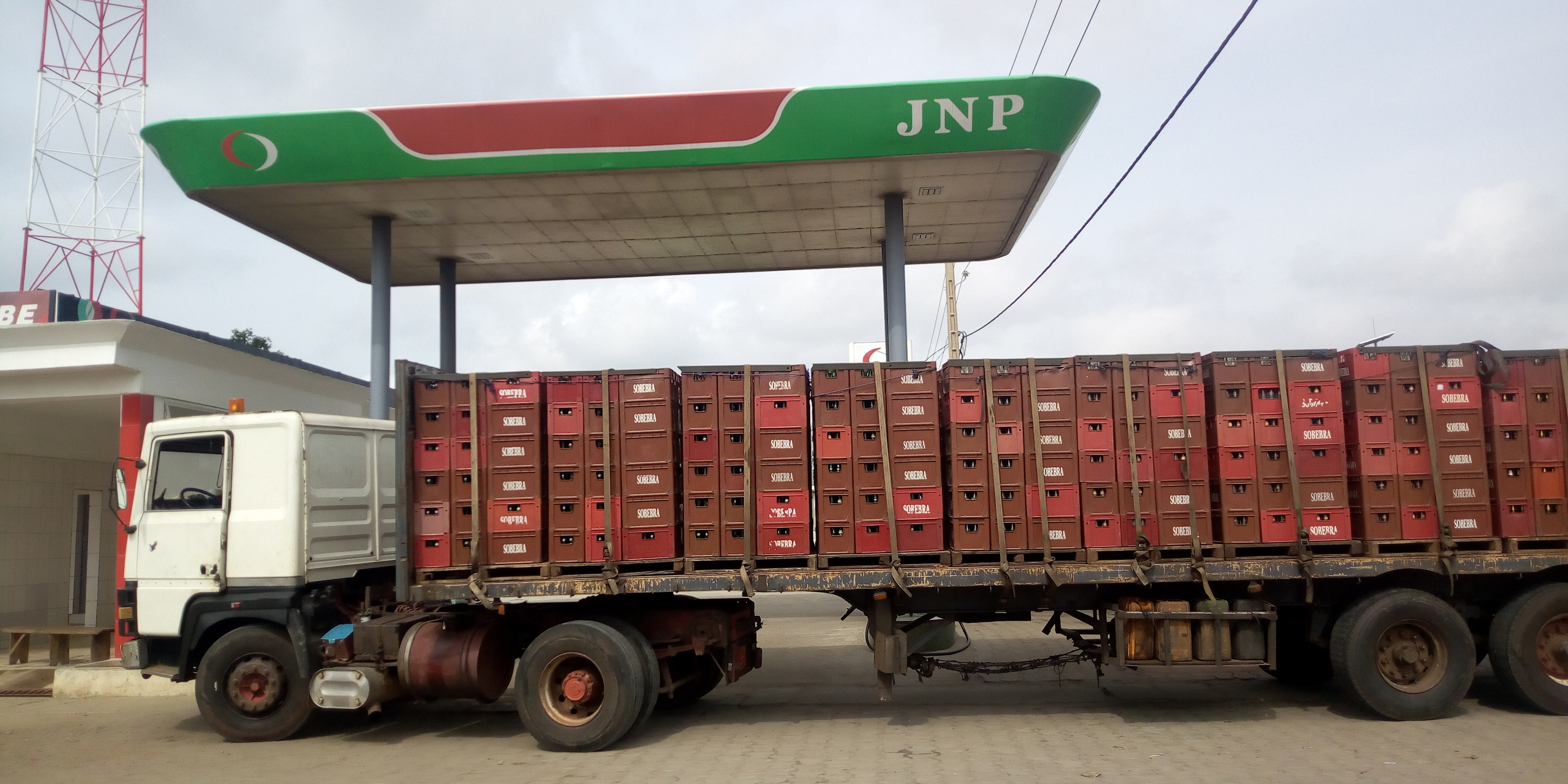 Camion de transport de marchandises de casier de SOBEBRA en plein action de ravitaillement en carburation à la station JNP This is an image with the theme "Africa on the Move or Transport" from: Benin